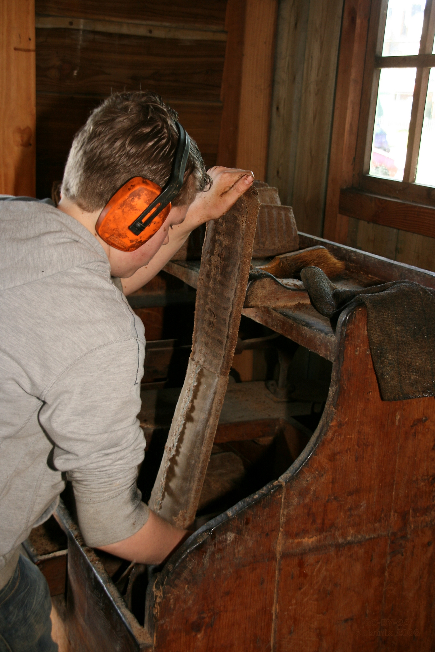 Koog aan de Zaan: oliemolen Het Pink: afstropen van een buul